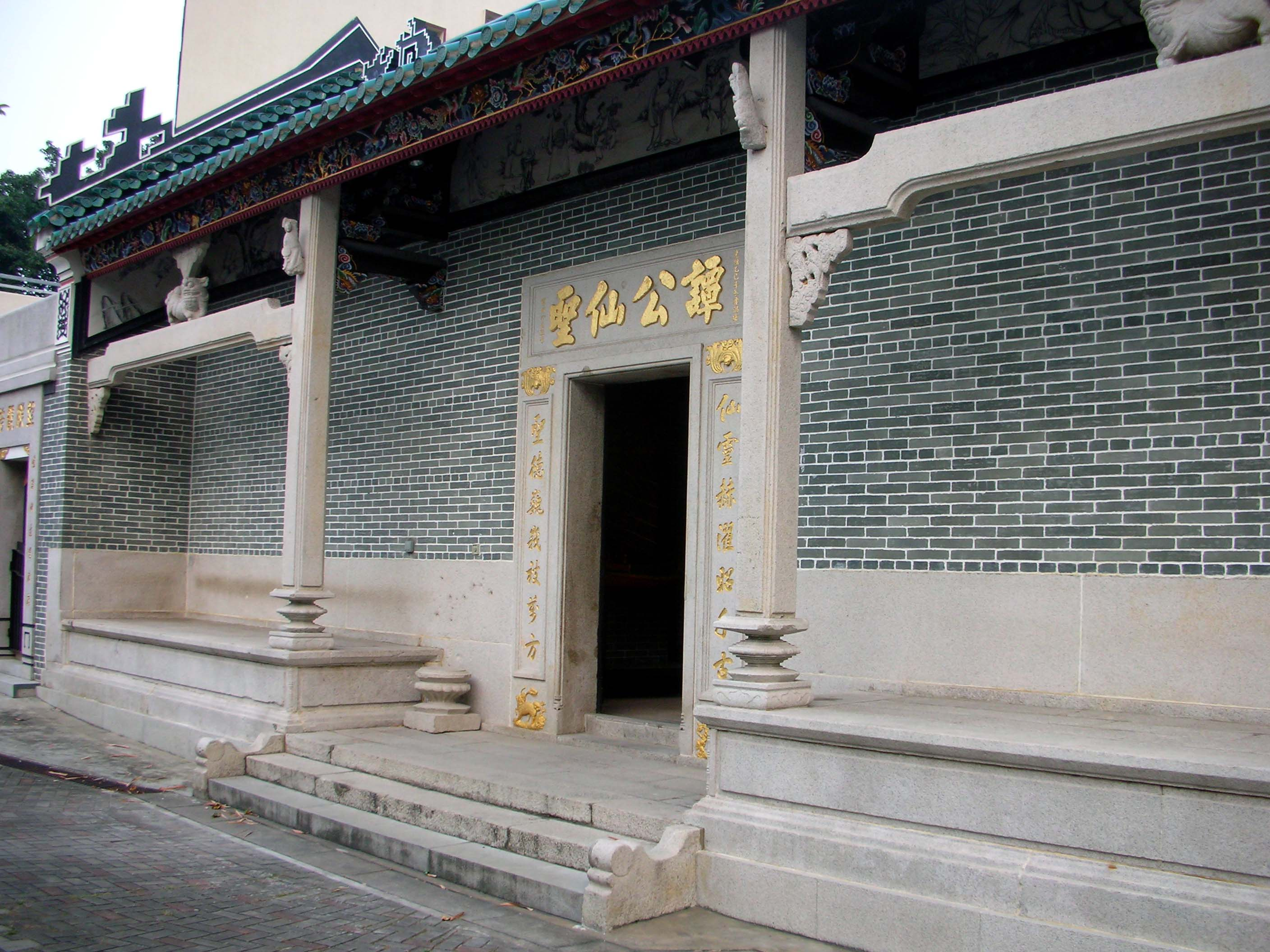 Tam Kung Temple, Shaukeiwan, Hong Kong 香港筲箕灣譚公廟